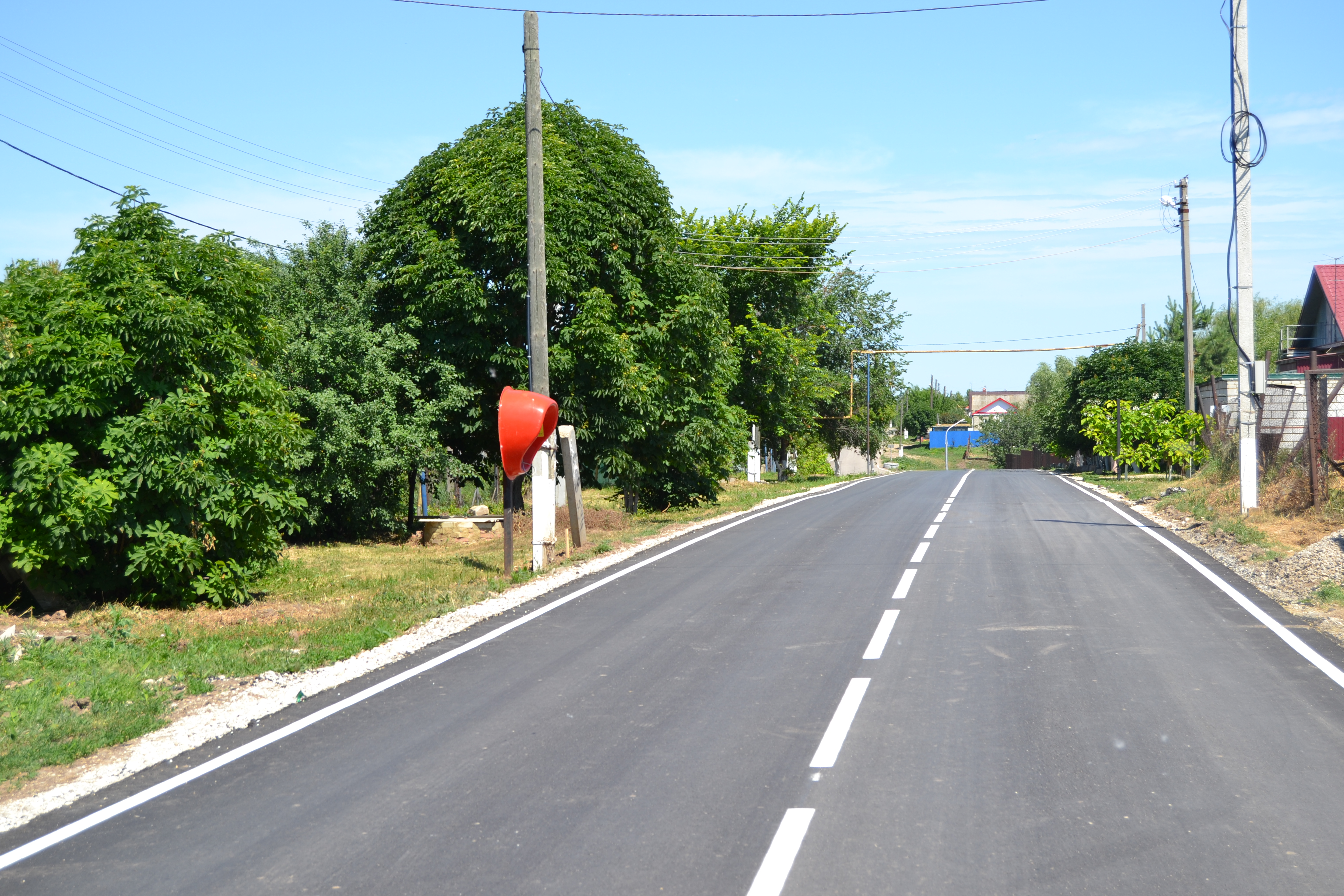 Изображение села. Улица Ленина (Сабуровка, Саратовский район)